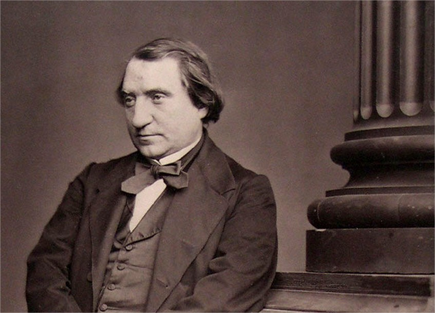 Taqbaylit: ..